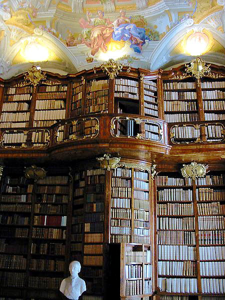 Bibliothek des Klosters St. Florian, Österreich. In diesem Saal befinden sich ca. 30.000 Bücher Fotograf: Stephan Brunker, 13.08.2003